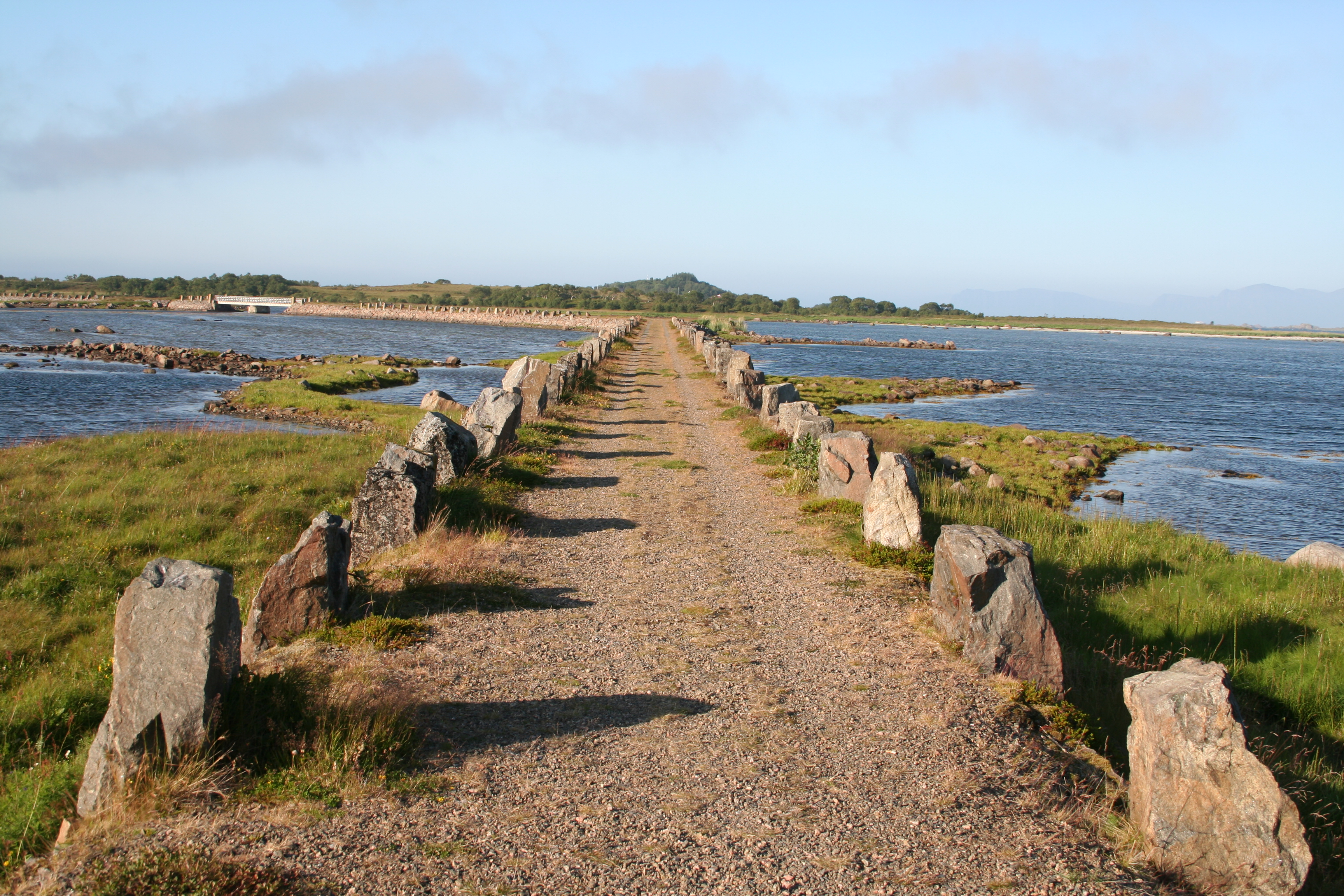 Old road near Strengelvåg in Øksnes, Norway